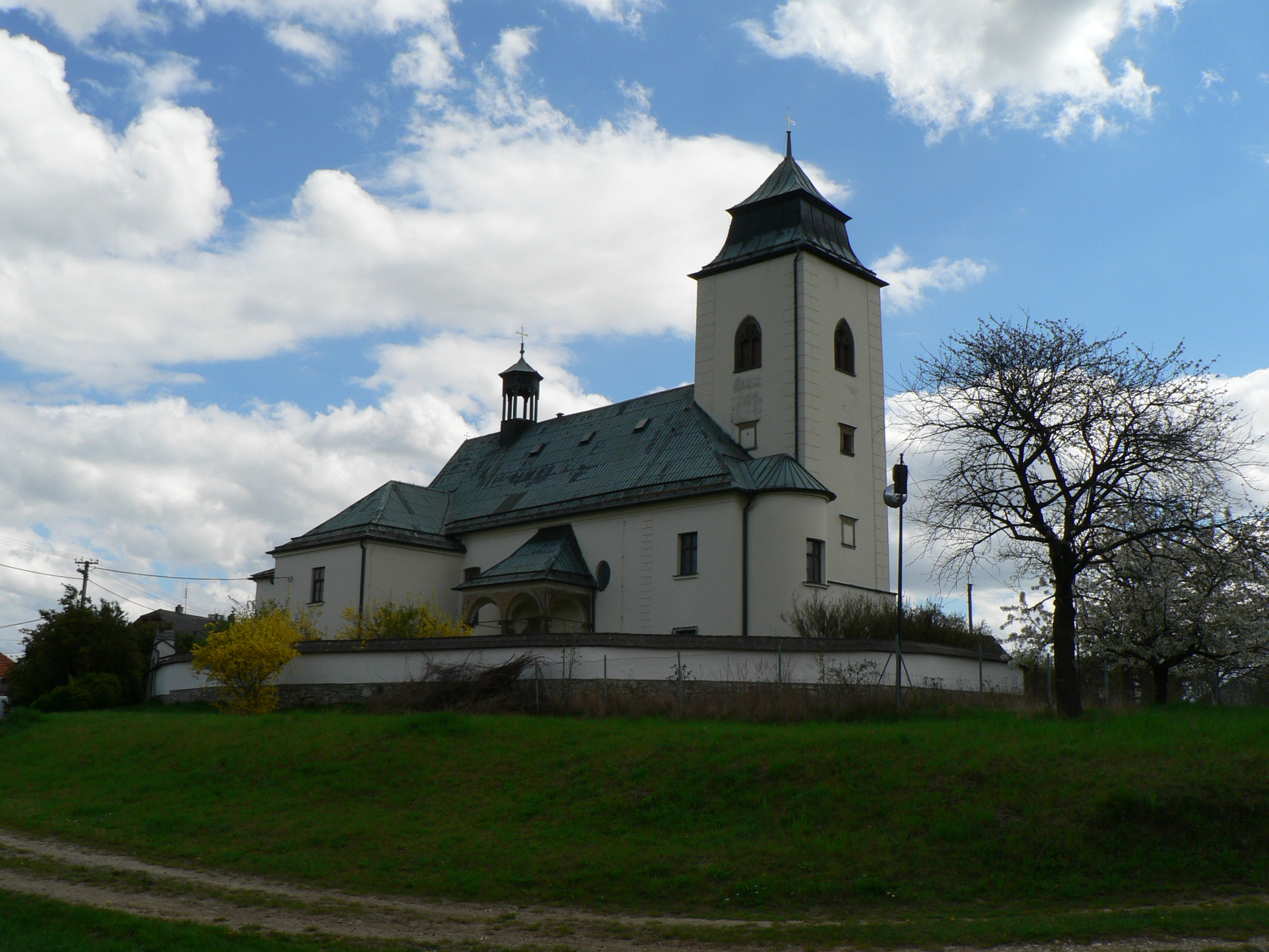 Kostel sv. Martina v Měrotíně, renesanční stavba s gotickým základem.